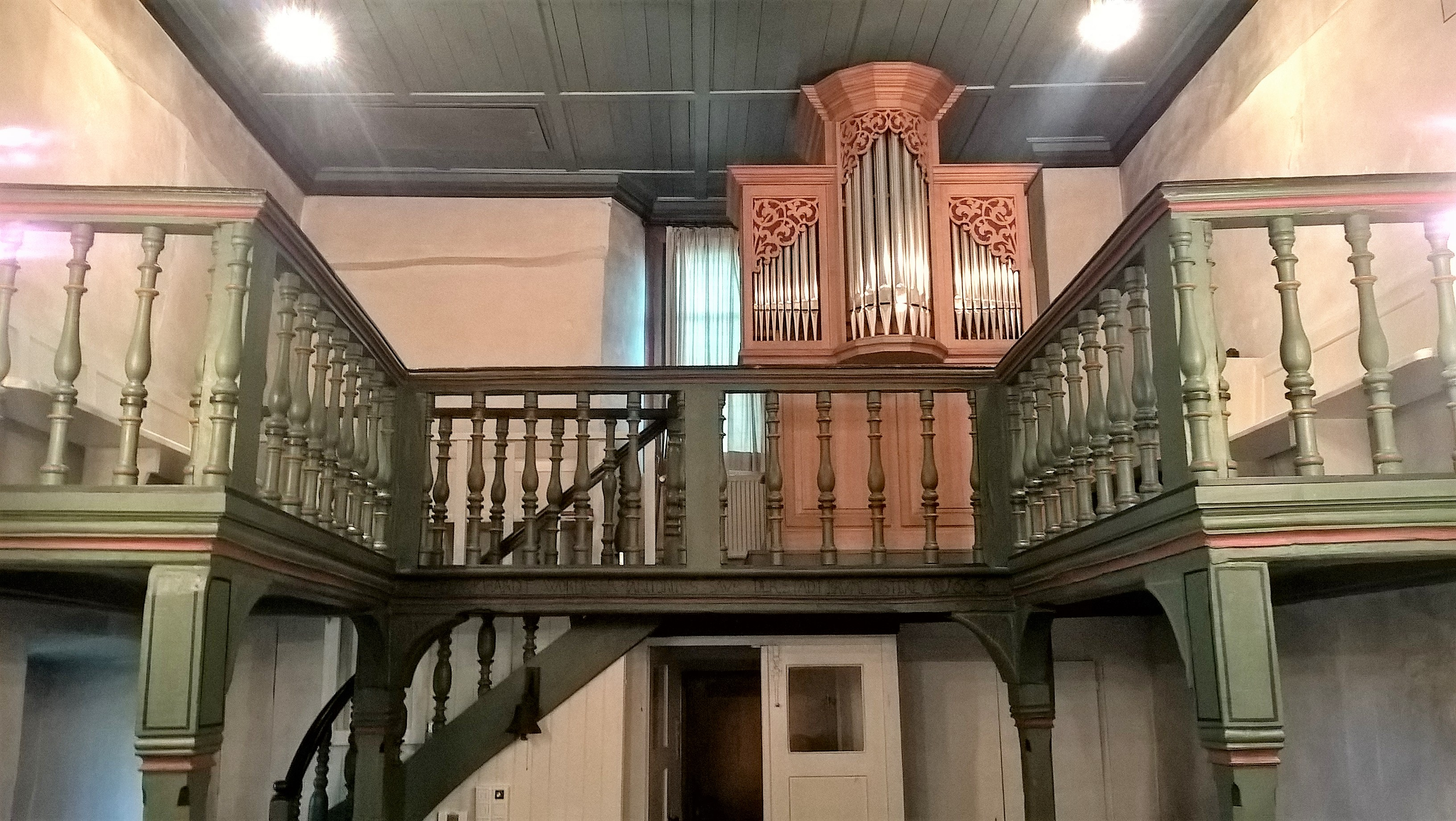 St. Jost in Marburg-Weidenhausen, Landkreis Marburg-Biedenkopf, Hessen, Deutschland